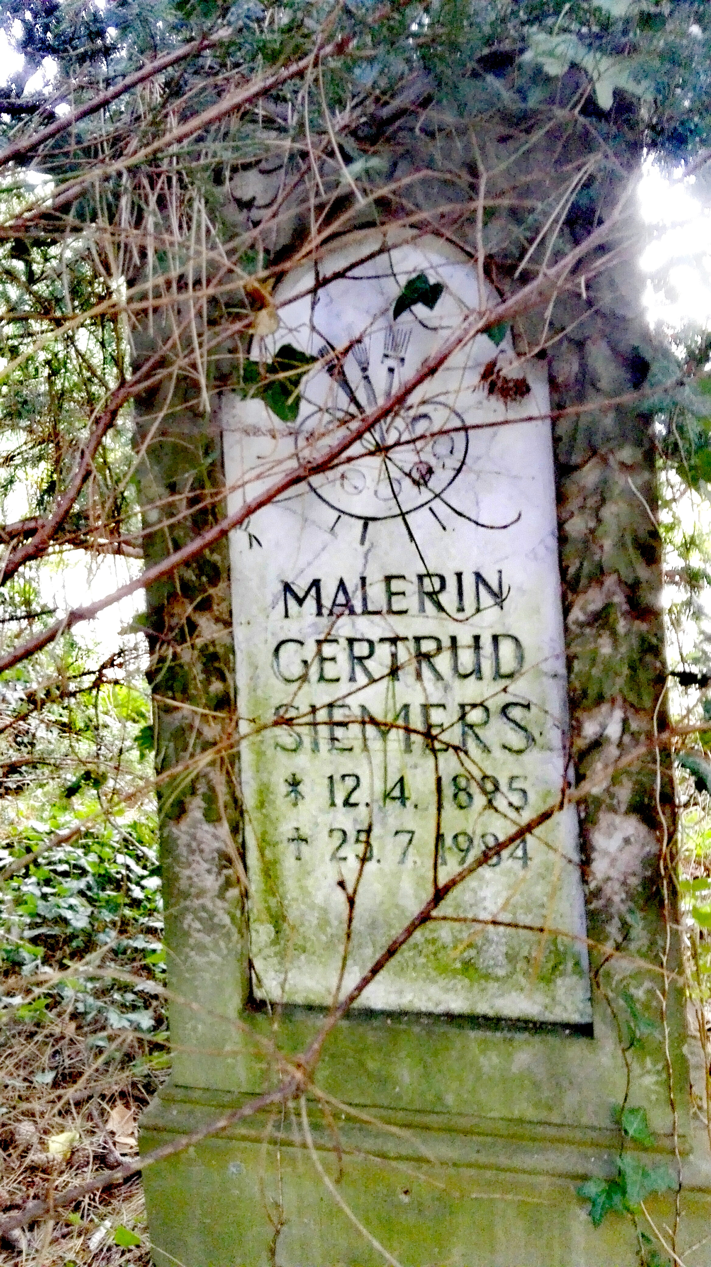 Grabstein von Gertrud Siemers außer Dienst